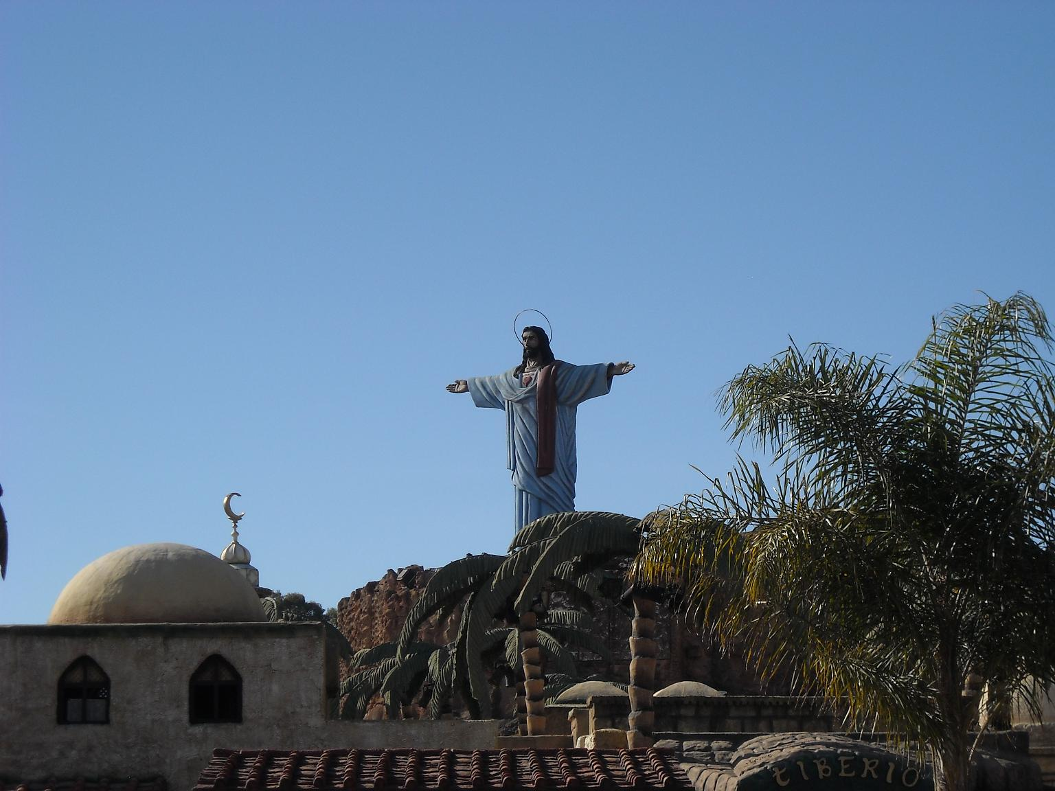 Imagen de Cristo en el parque Tierra Santa.